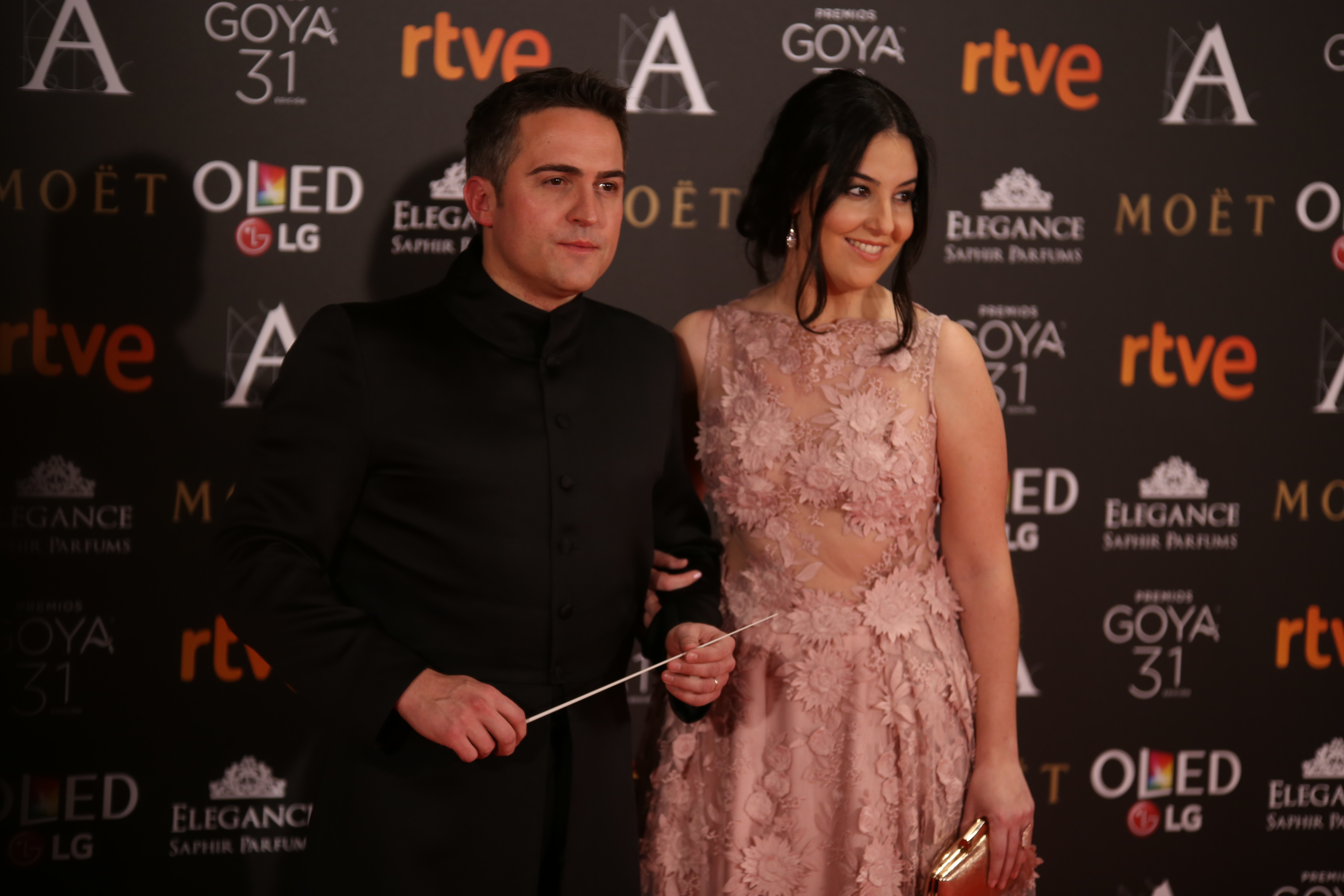 Premios Goya 2017